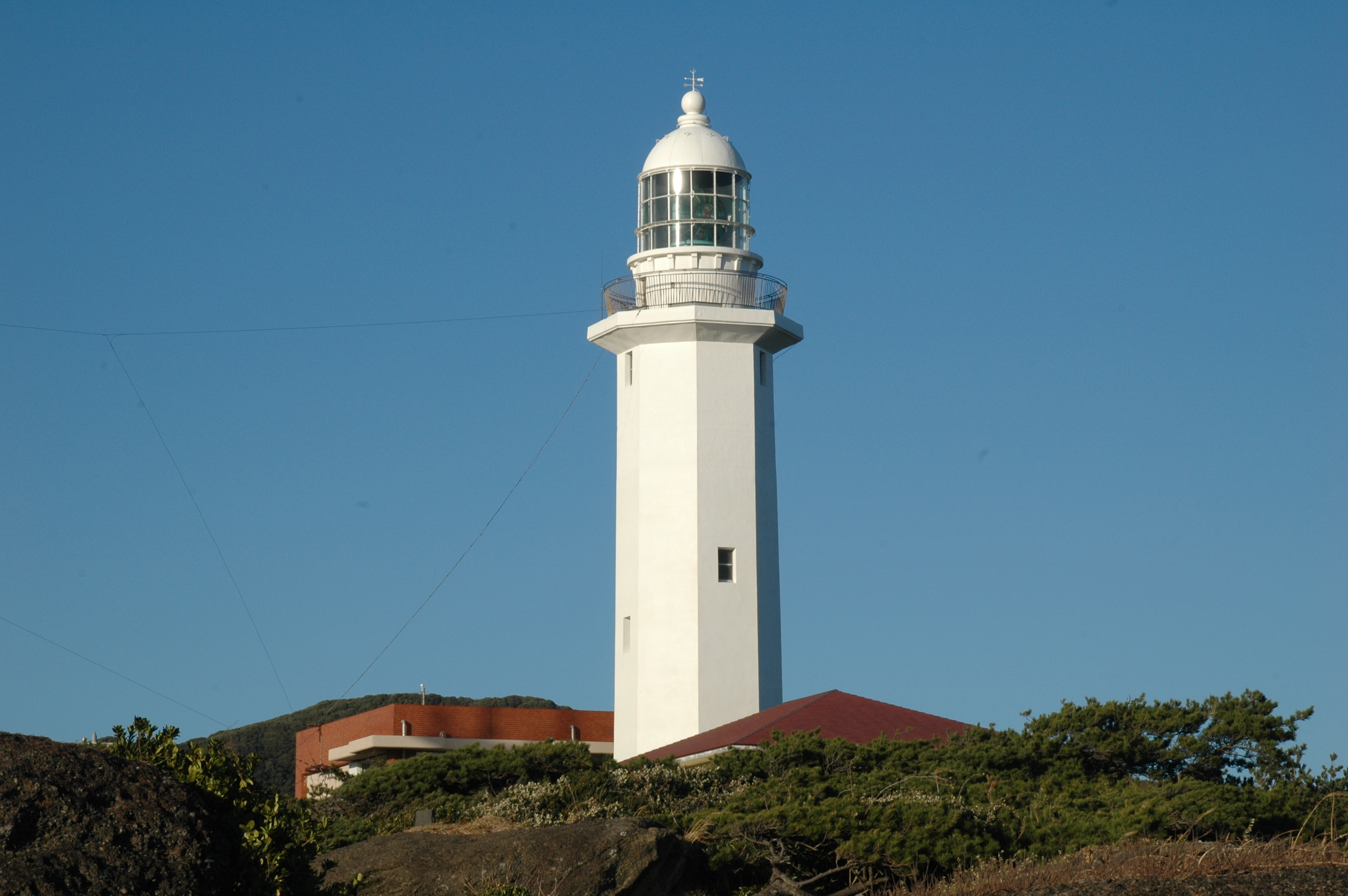 Nojimazaki Lighthouse, Minamiboso, Chiba, Japan